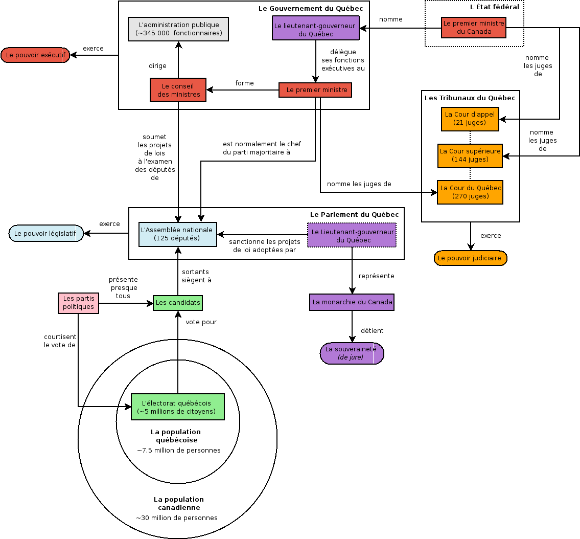 Nom : Organisation des pouvoirs au Québec Auteur : Utilisateur:Mathieugp Date : Novembre 2006 Outil : Dia v 0.95 pour GNOME